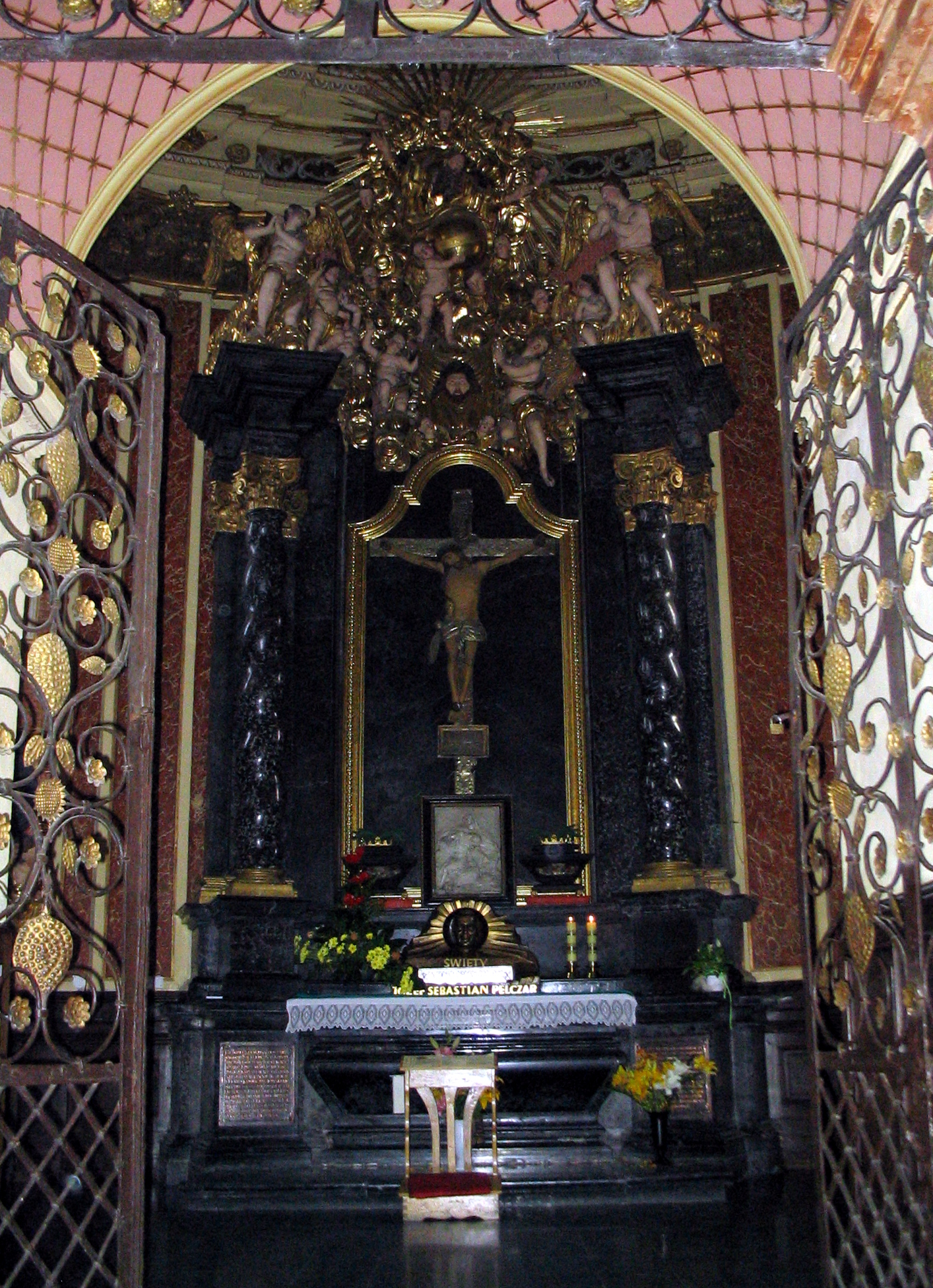 Bazylika Archikatedralna pod wezwaniem Jana Chrzciciela w Przemyślu - kaplica Fredrów z relikwiami bł. Józefa Sebastiana Pelczara